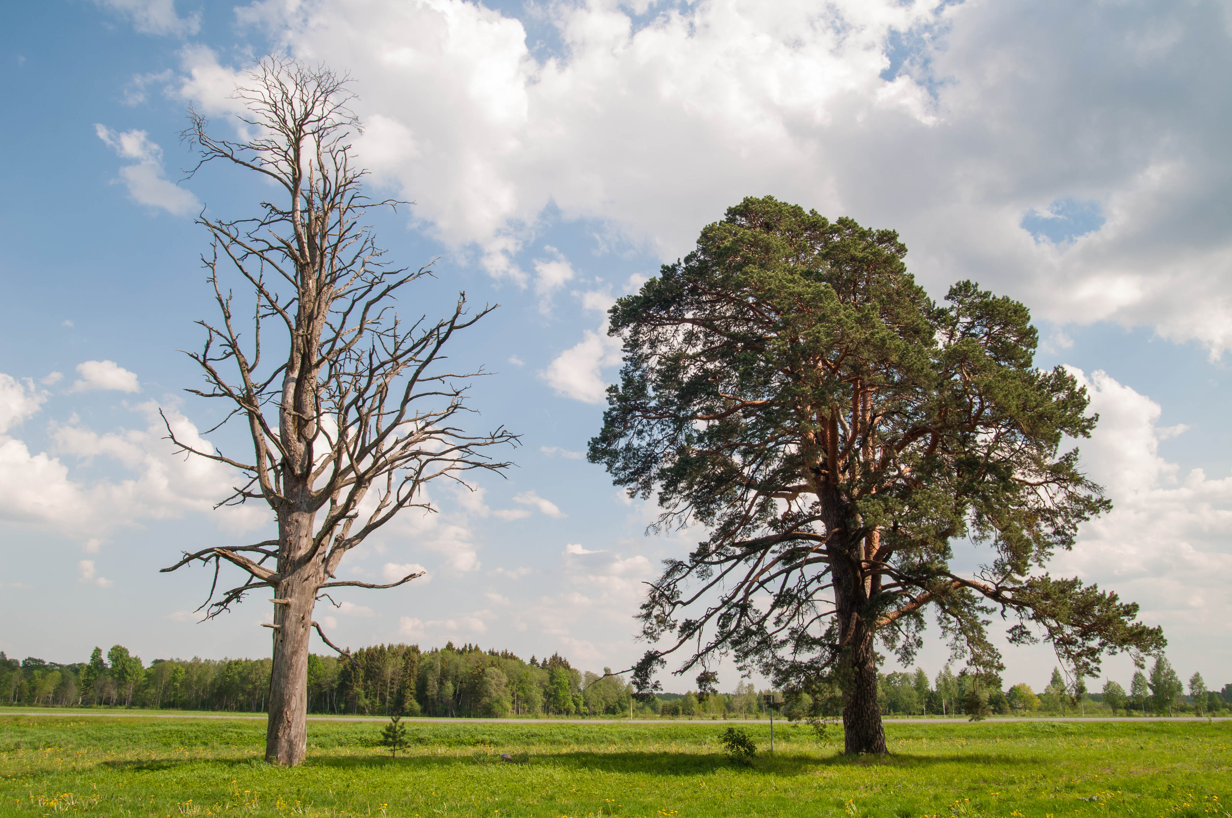 Ojasoo männid (2)